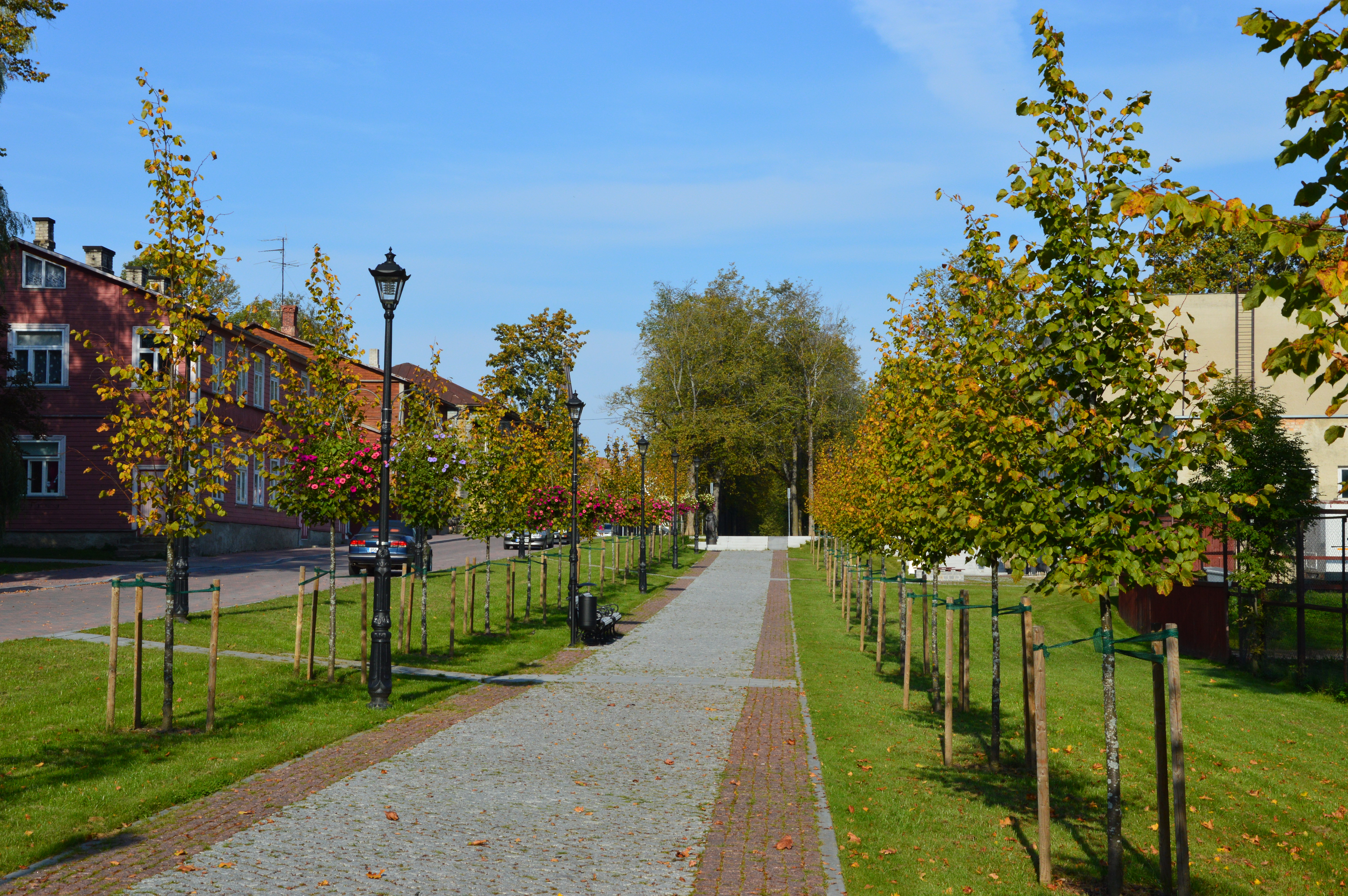 Katariina allee Võrus